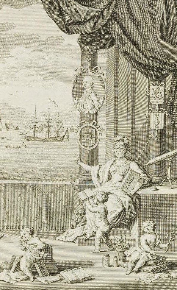 Gravure in Verhandelingen van het Zeeuwsch Genootschap der Wetenschappen (1769)